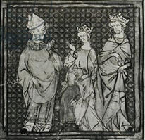 Karel III. Tlustý s rodinou